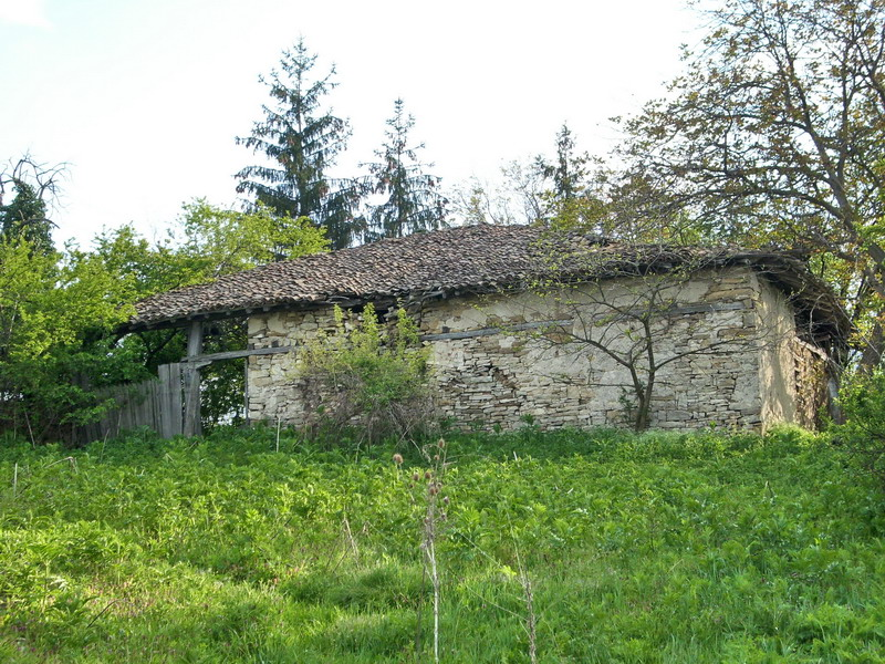 Село Бракница, община Попово - стара и вече изоставена къща